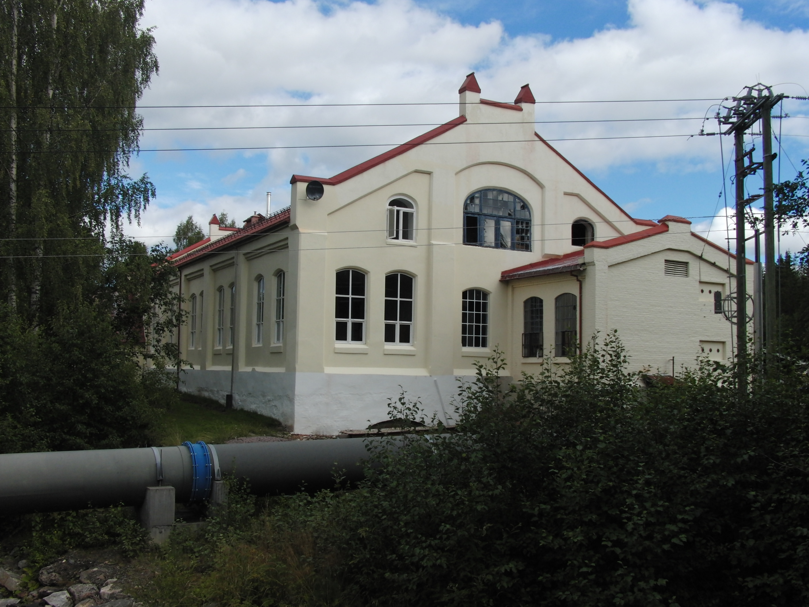 Det nedlagte Skrankefoss kraftverk.